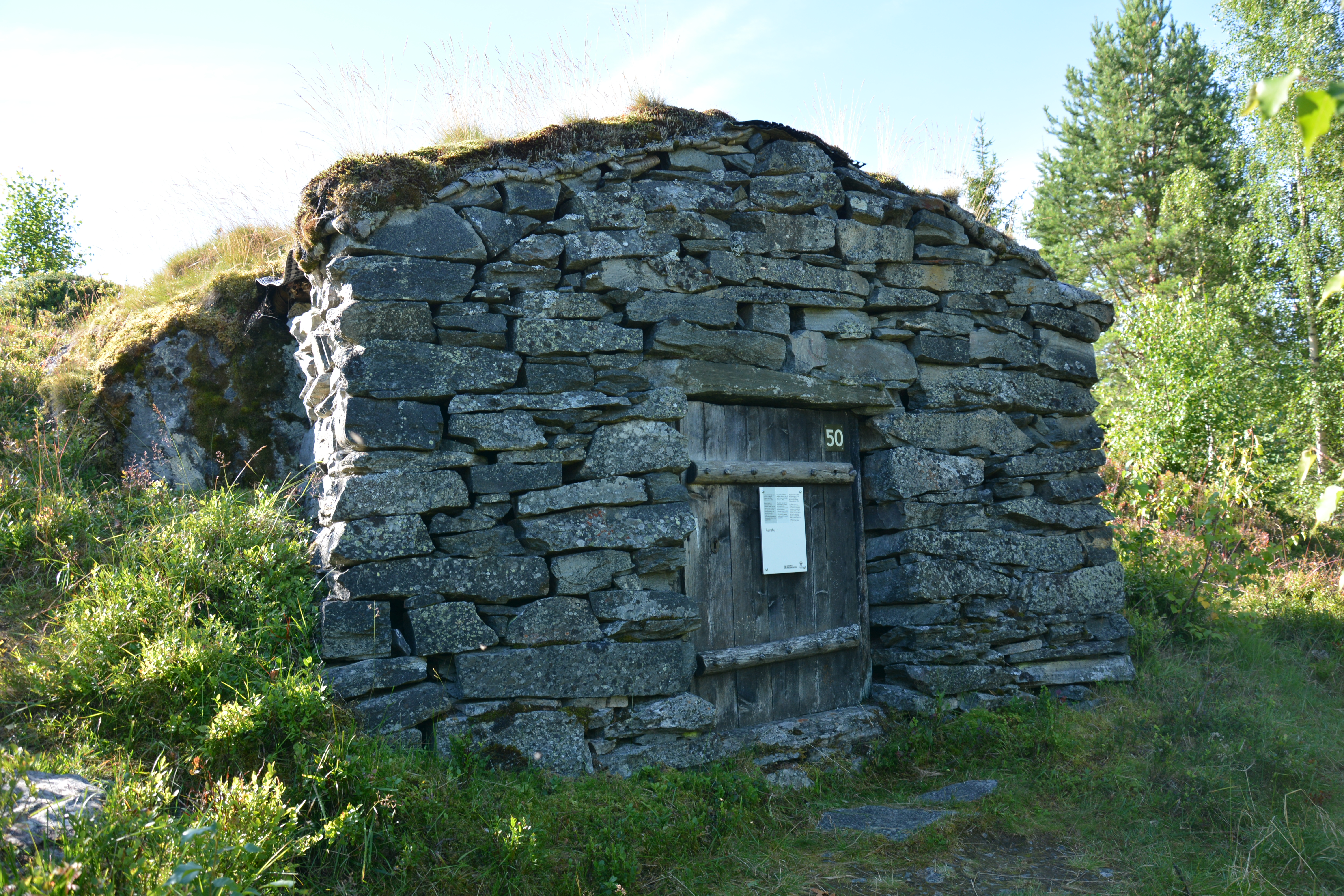 Kopi av Galdebergbua på nordsida av Bygdin, satt opp på Valdres Folkemuseum i 1955.